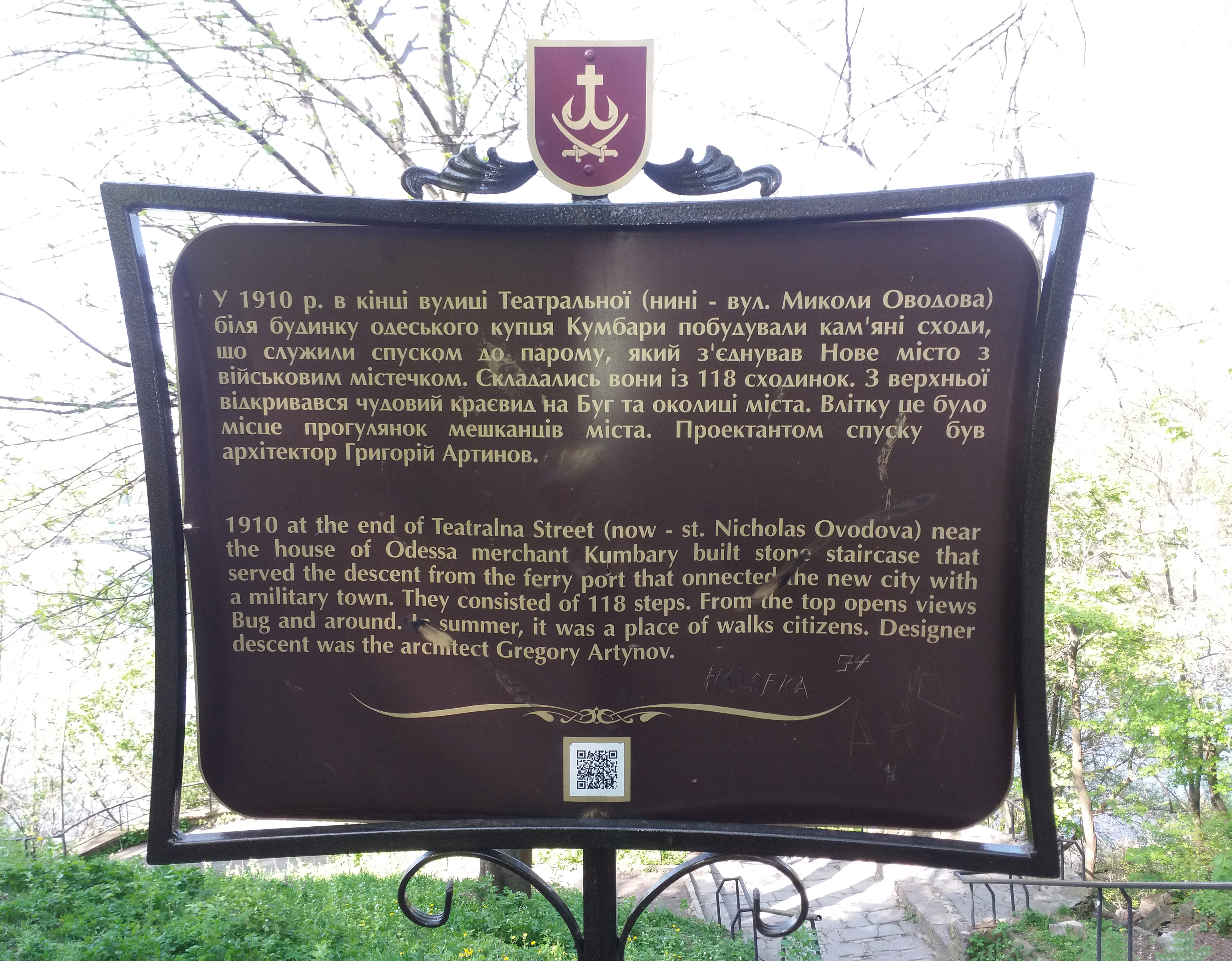 м. Вінниця, кам'яні сходи до річки Південний Буг (арх. Г. Артинов, 1910). Вулиця М. Оводова, 1